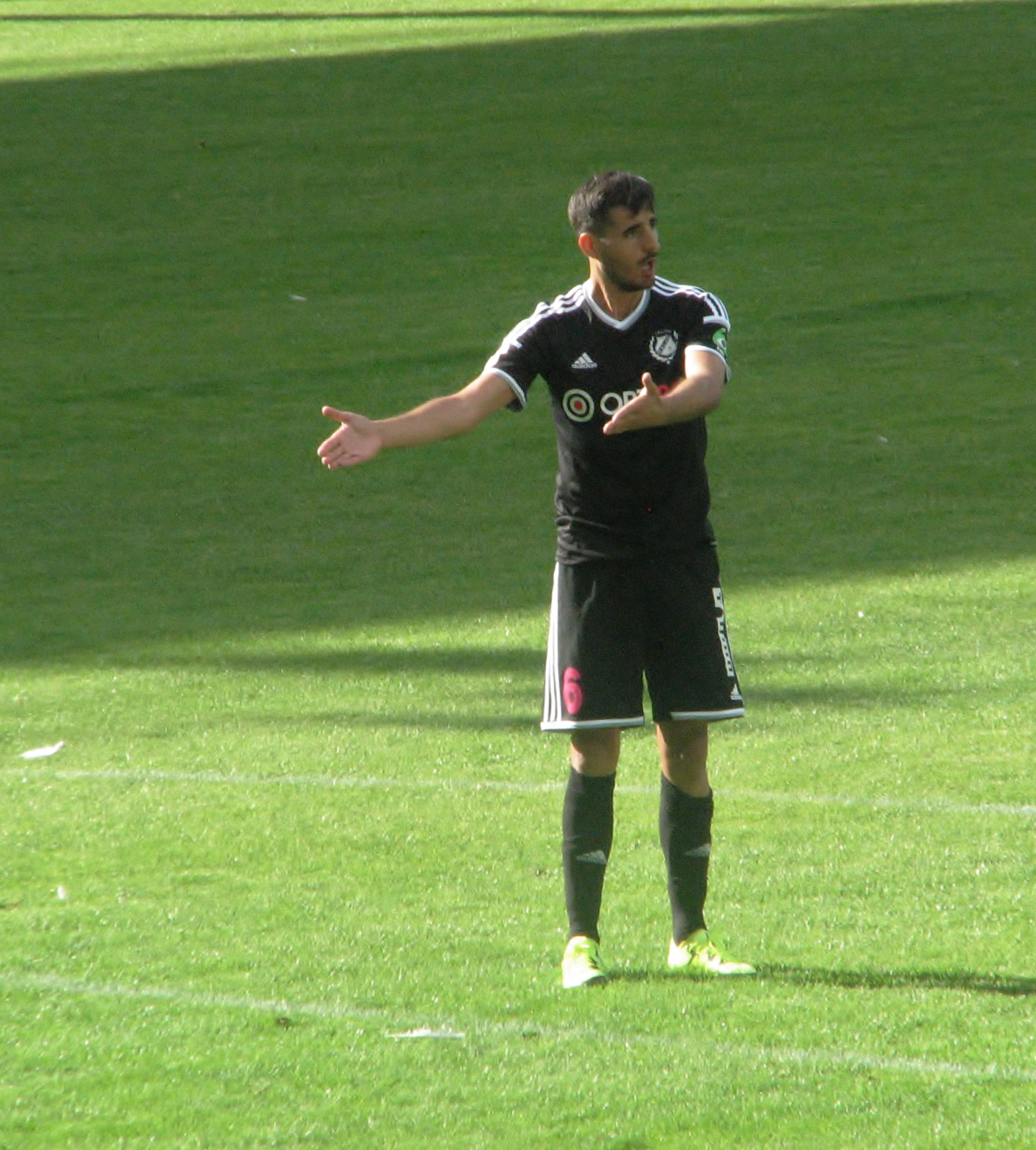 Jorge Rodrigues mängimas FC Flora vastu